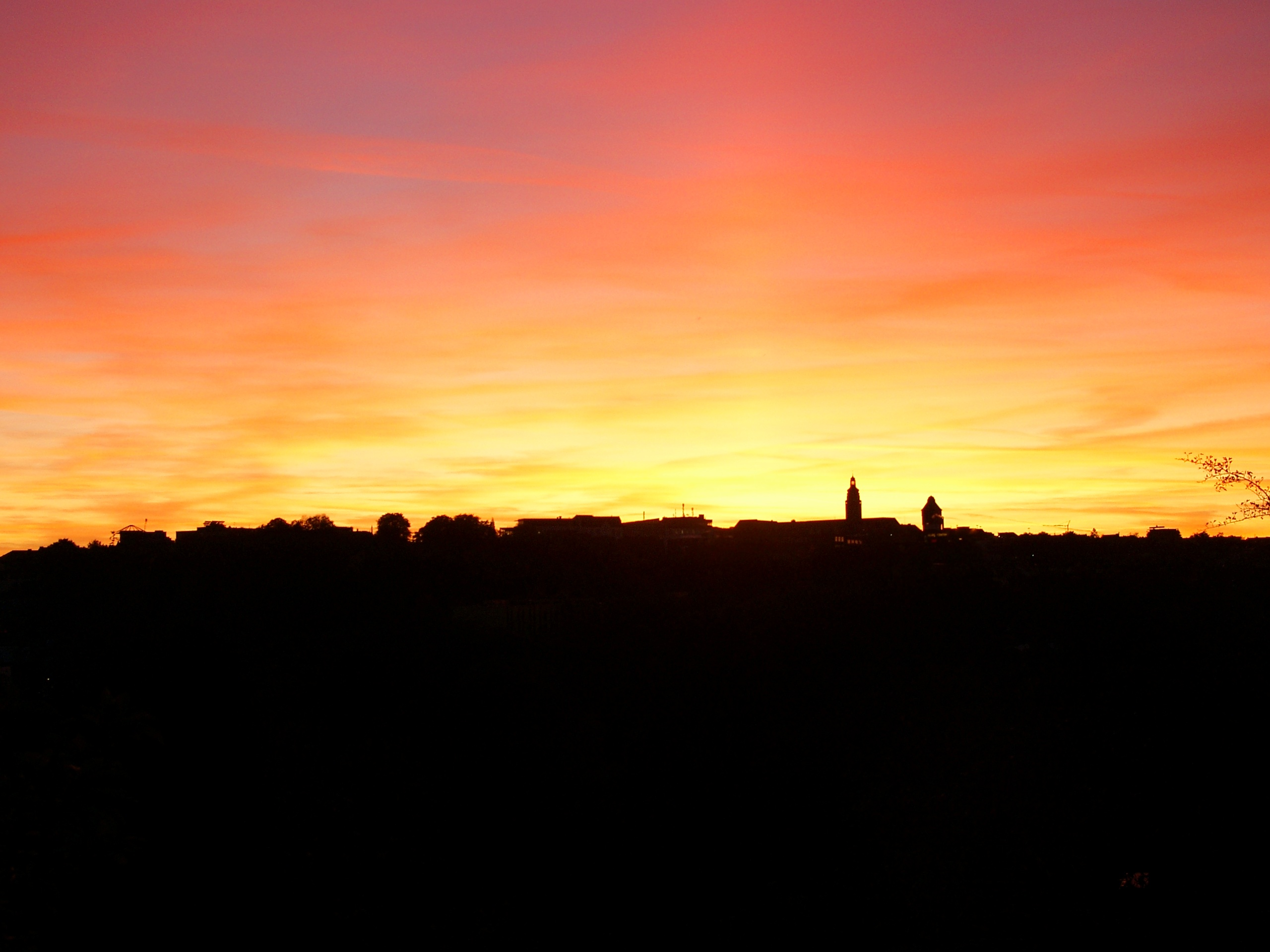 Remscheids Skyline - Foto am Hohenhagen geschossen, Oktober 2011